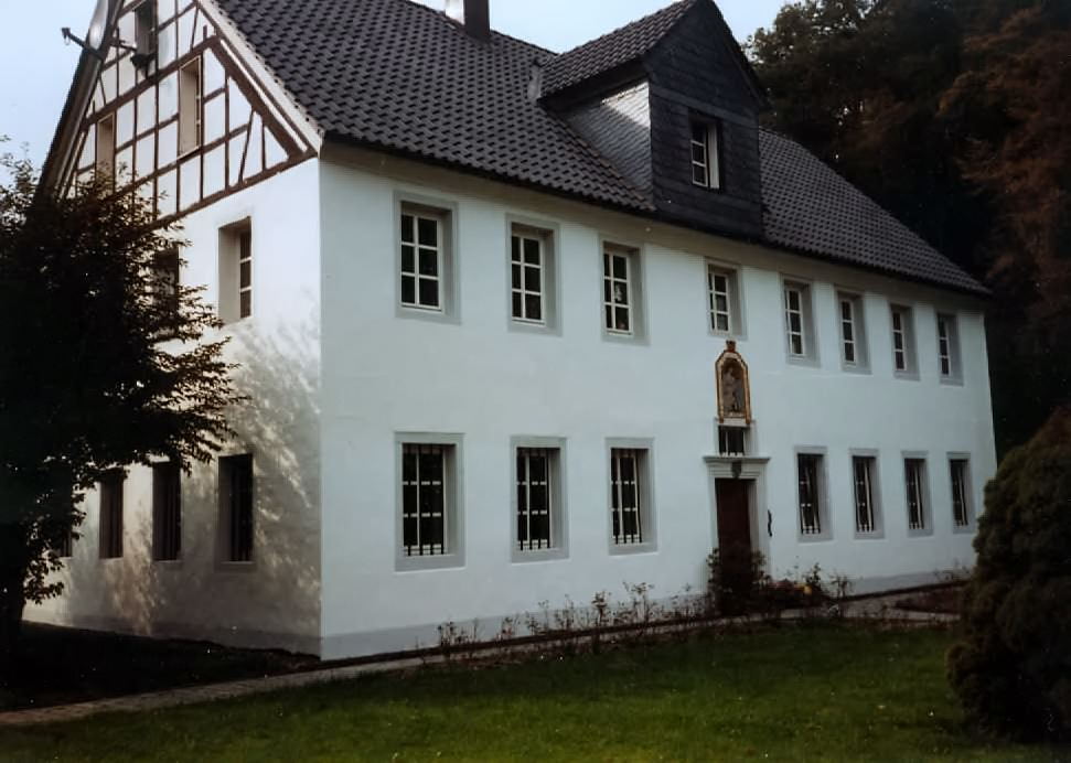 Loosenau im Dhünntal